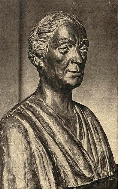 Popiersie Aleksandry Piłsudskiej autorstwa rzeźbiarki Balbiny Świtycz-Widackiej